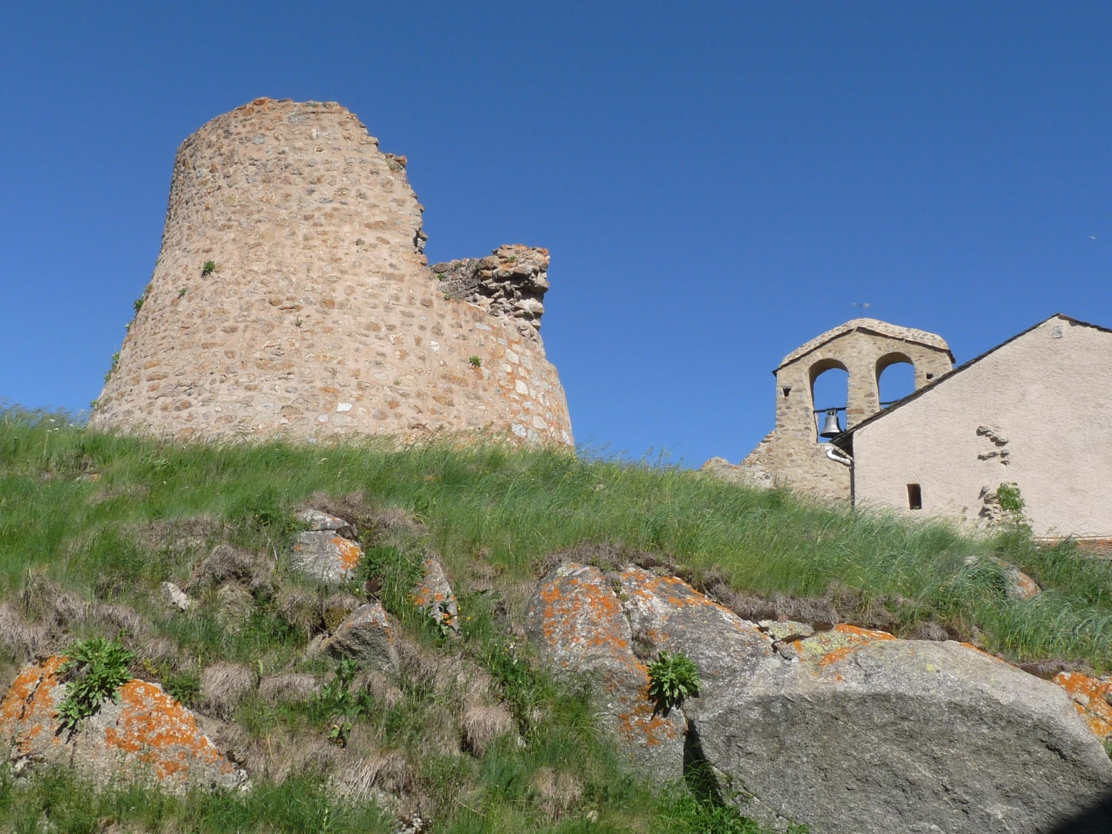 Ancienne tour de La Llagonne, Pyrénées-Orientales, France